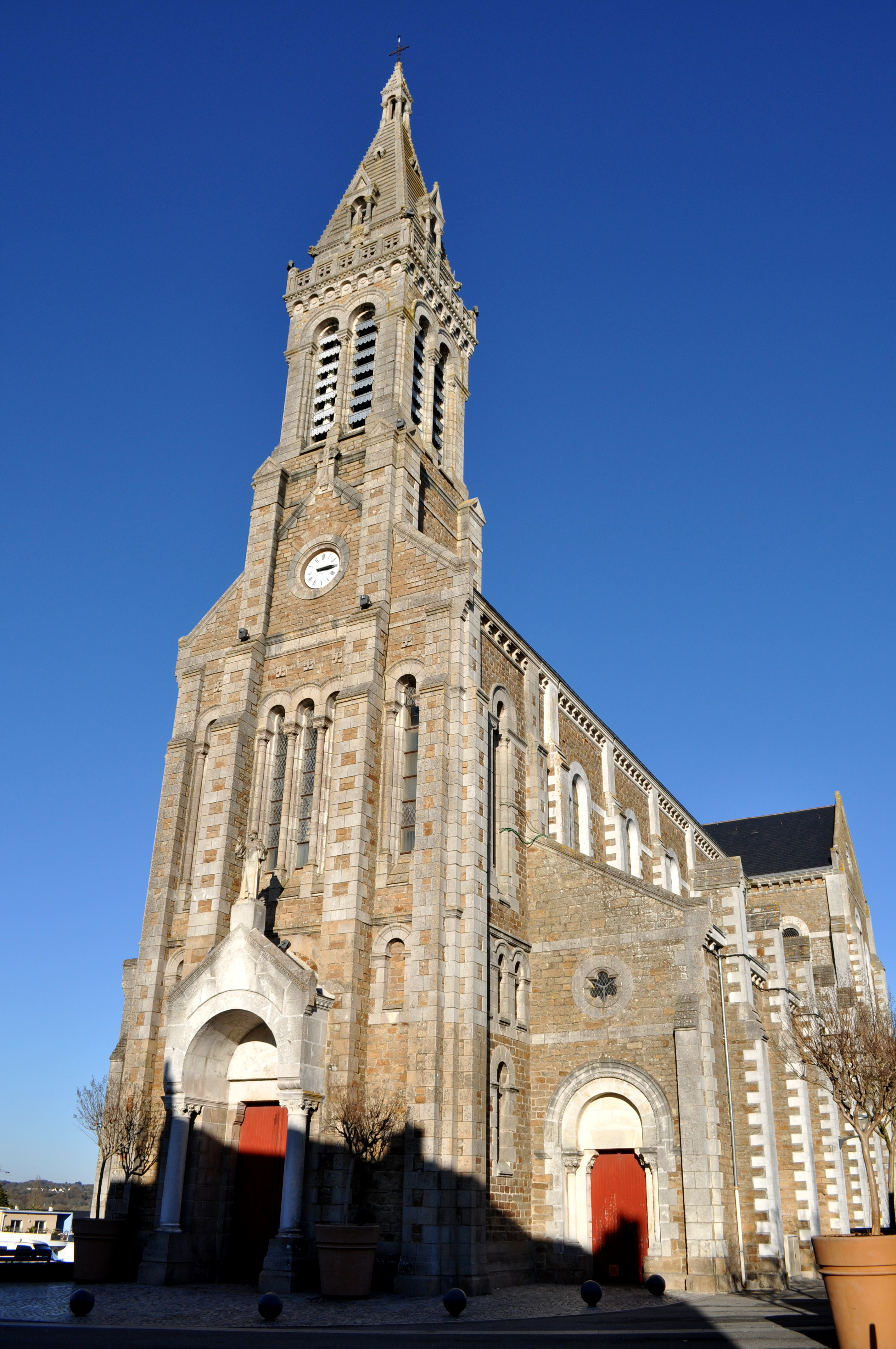 Iliz Antr (Bro-Naoned).